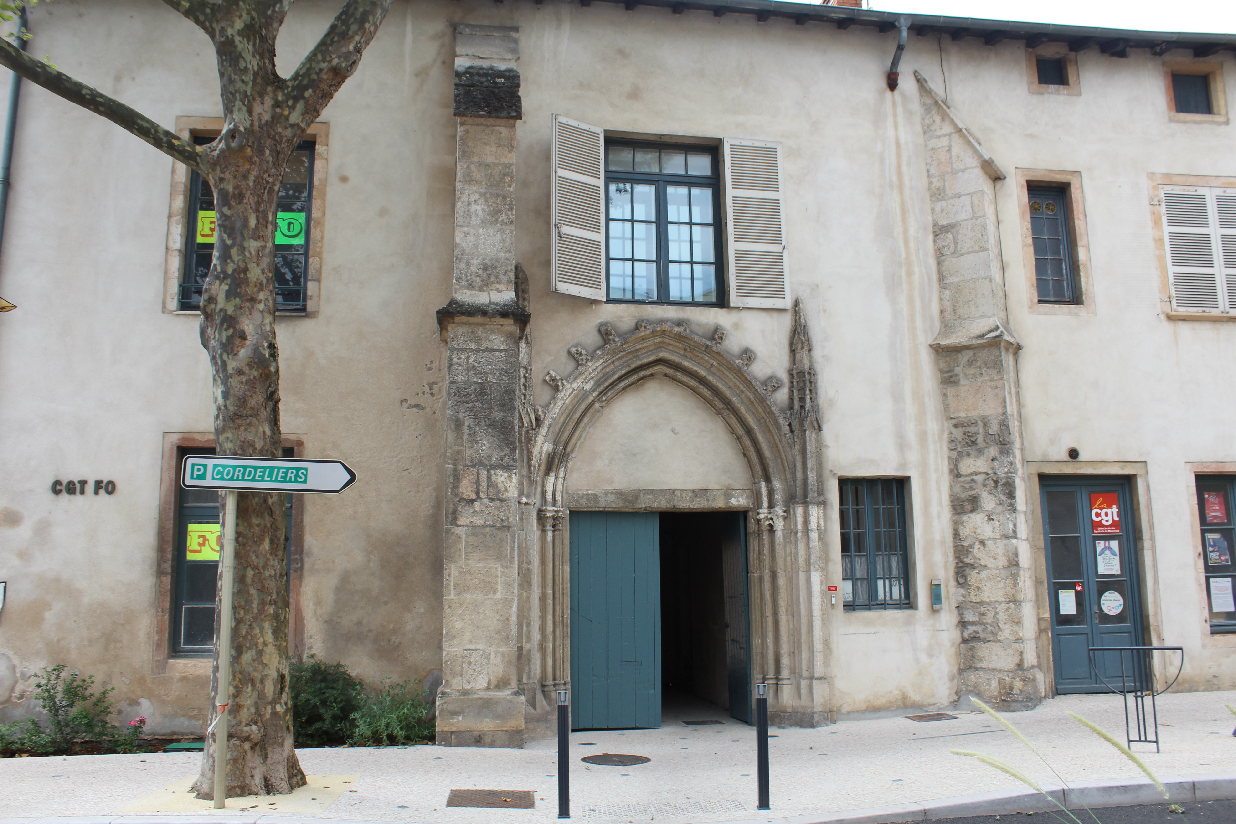 Portail gothique du XIVe siècle du couvent des Cordeliers, à Mâcon